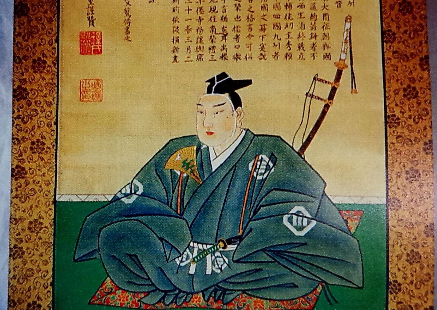 来島長親の肖像。